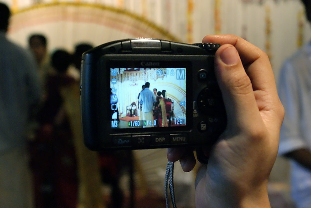 ഡിജിറ്റൽ ക്യാമറ കൊണ്ടു പടം പിടിക്കുന്നു.